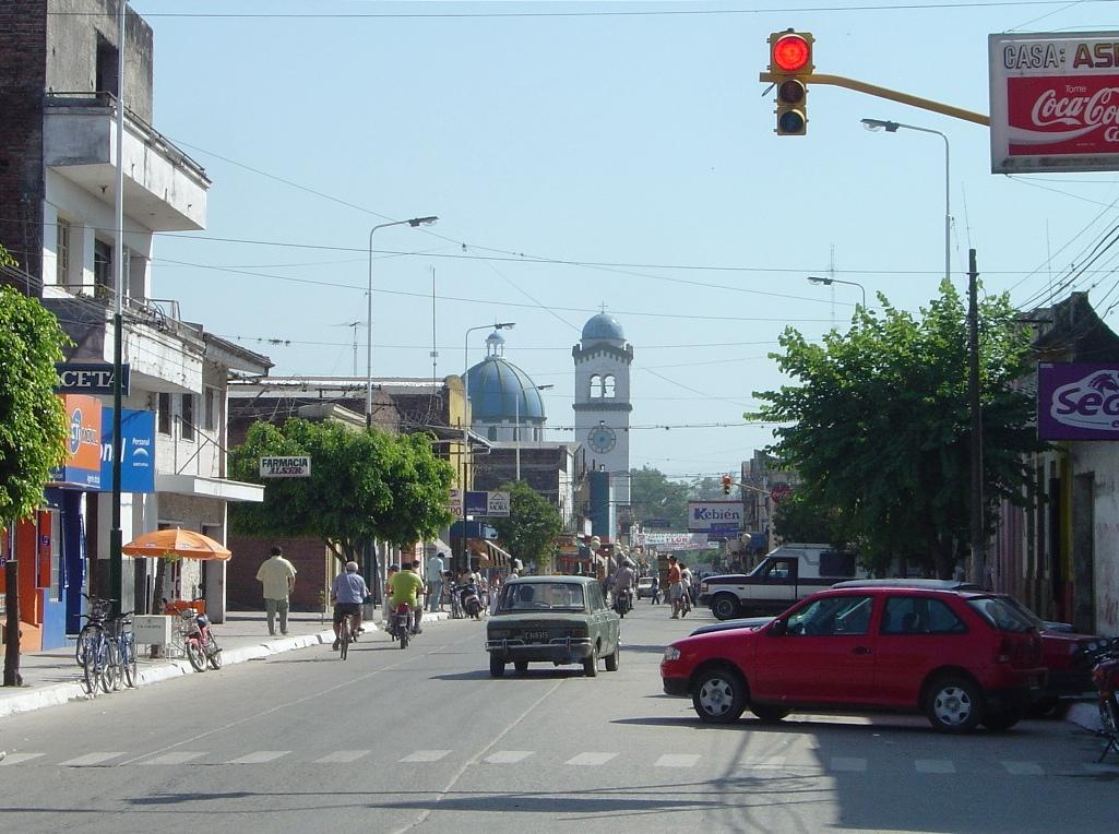 Calle Colón/Colón Street. Monteros, Tucumán Province, Argentina.